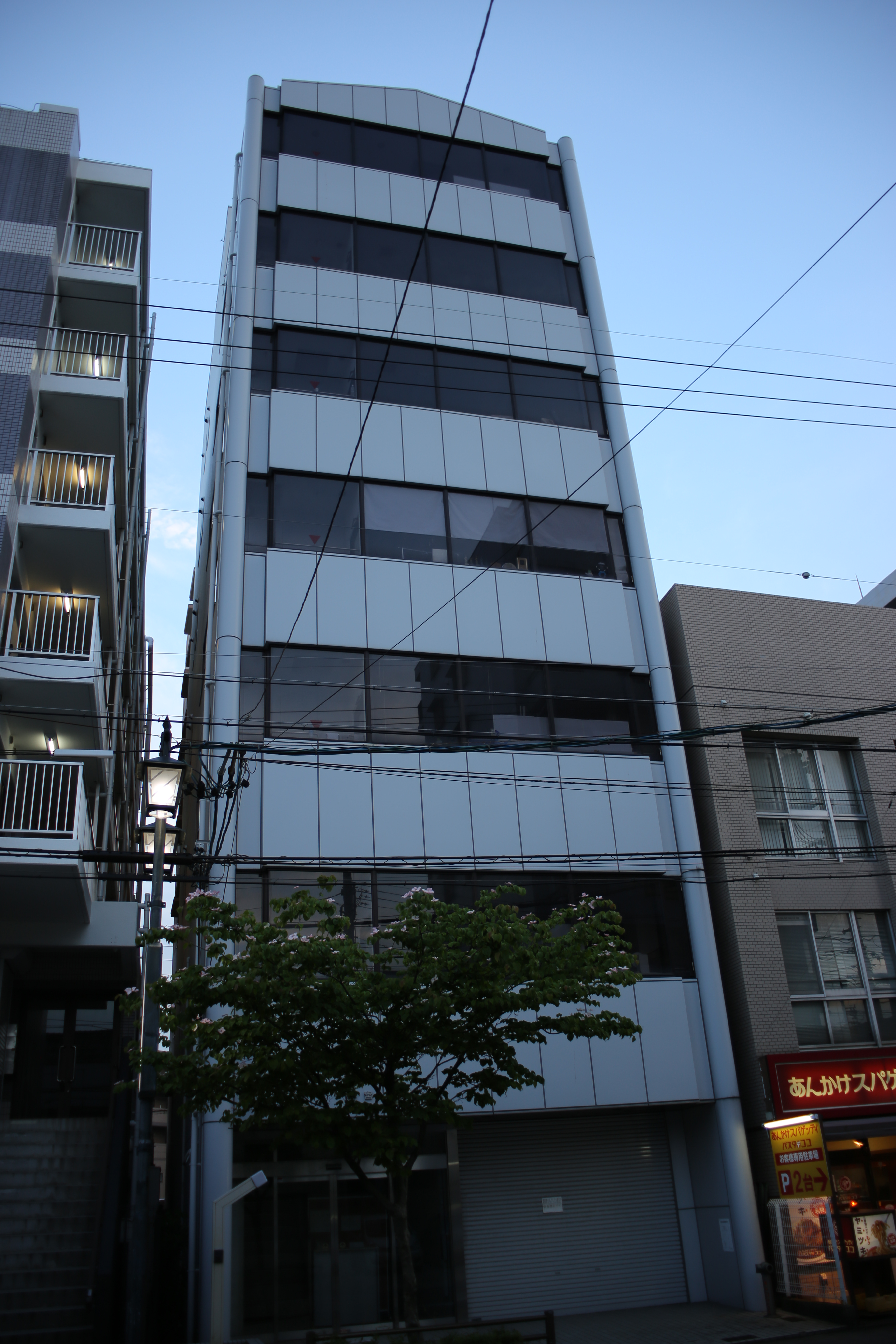 名古屋市熱田区三本松町のあおい書店本社（神宮葵ビル）を北側公道東側より撮影